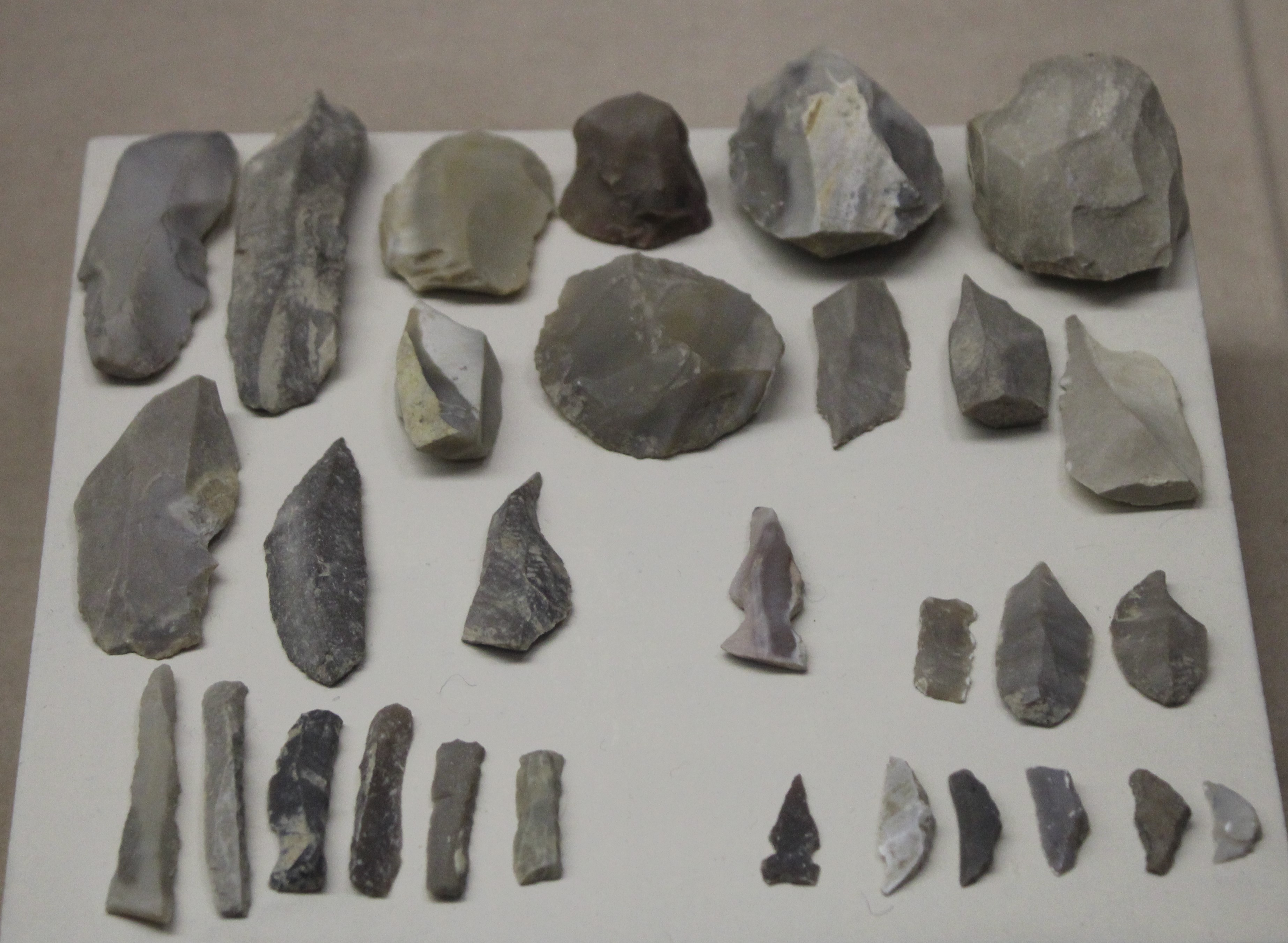 Outillage lithique provenant d'el Khiam, Cisjordanie, fouilles de René Neuville. Natoufien supérieur / Khiamien (début du PPNA). Microlithes, pointes de type el Khiam, microburin, lamelles à dos, perçoirs, grattoirs, nucléus. Musée d'archéologie nationale.